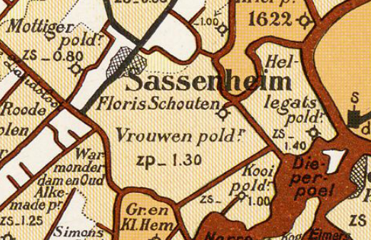 Floris_Schouten_Vrouwenpolder